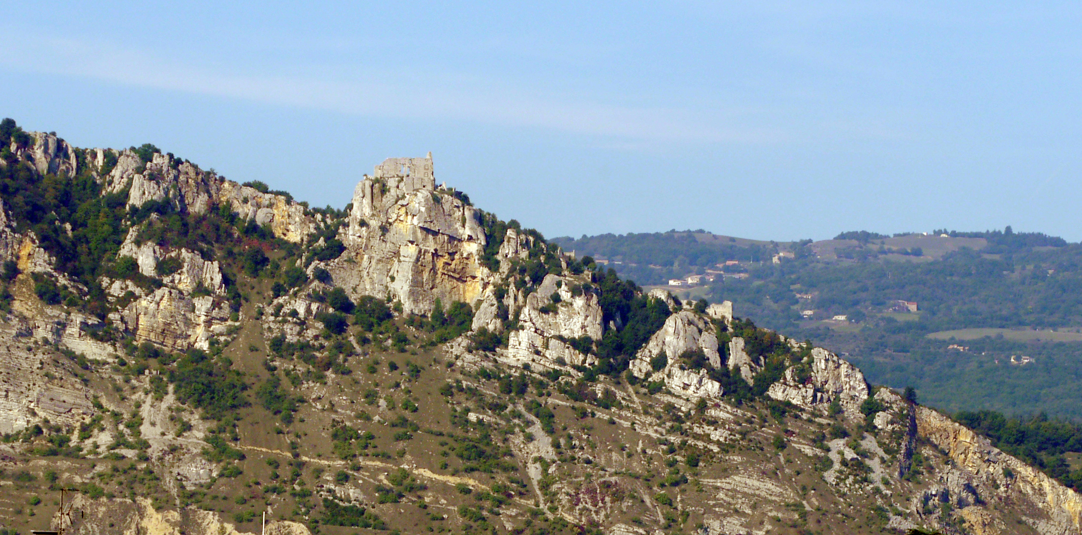 Ruines du château de Crussol, dans l'Ardèche, photographie prise depuis Valence, dans la Drôme. .